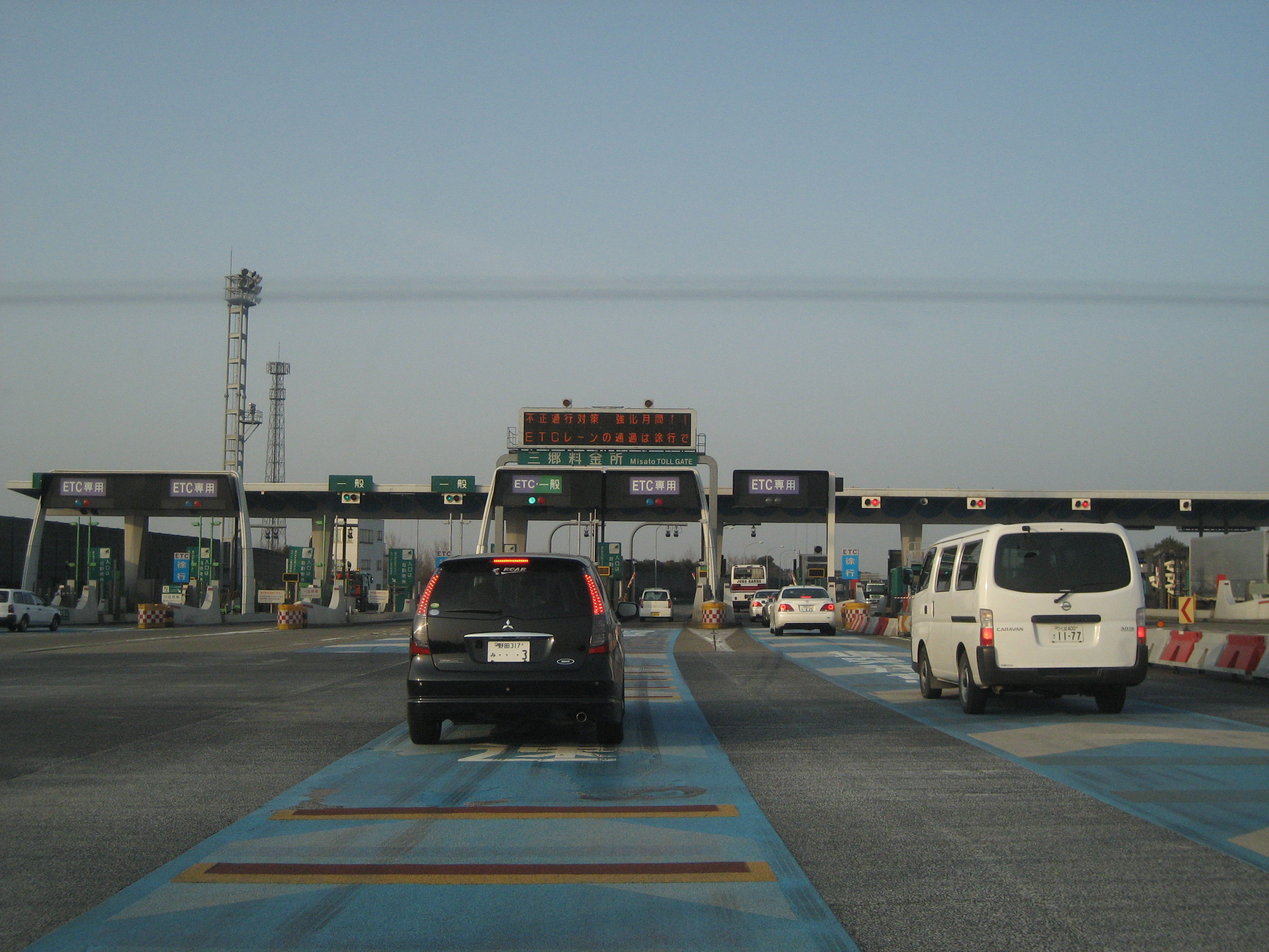 常磐道三郷料金所